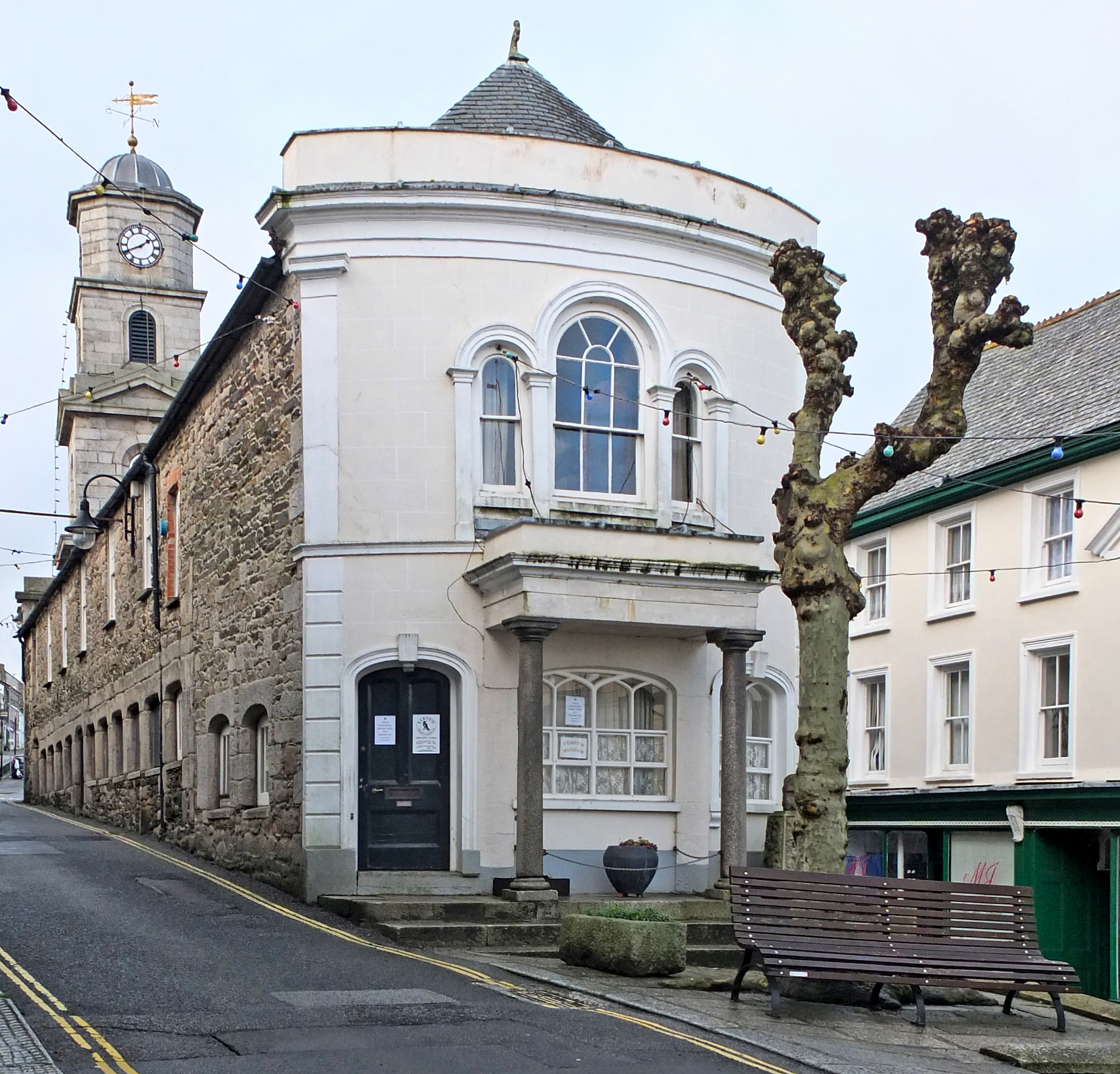 Grade 2*. C17, extended 1839